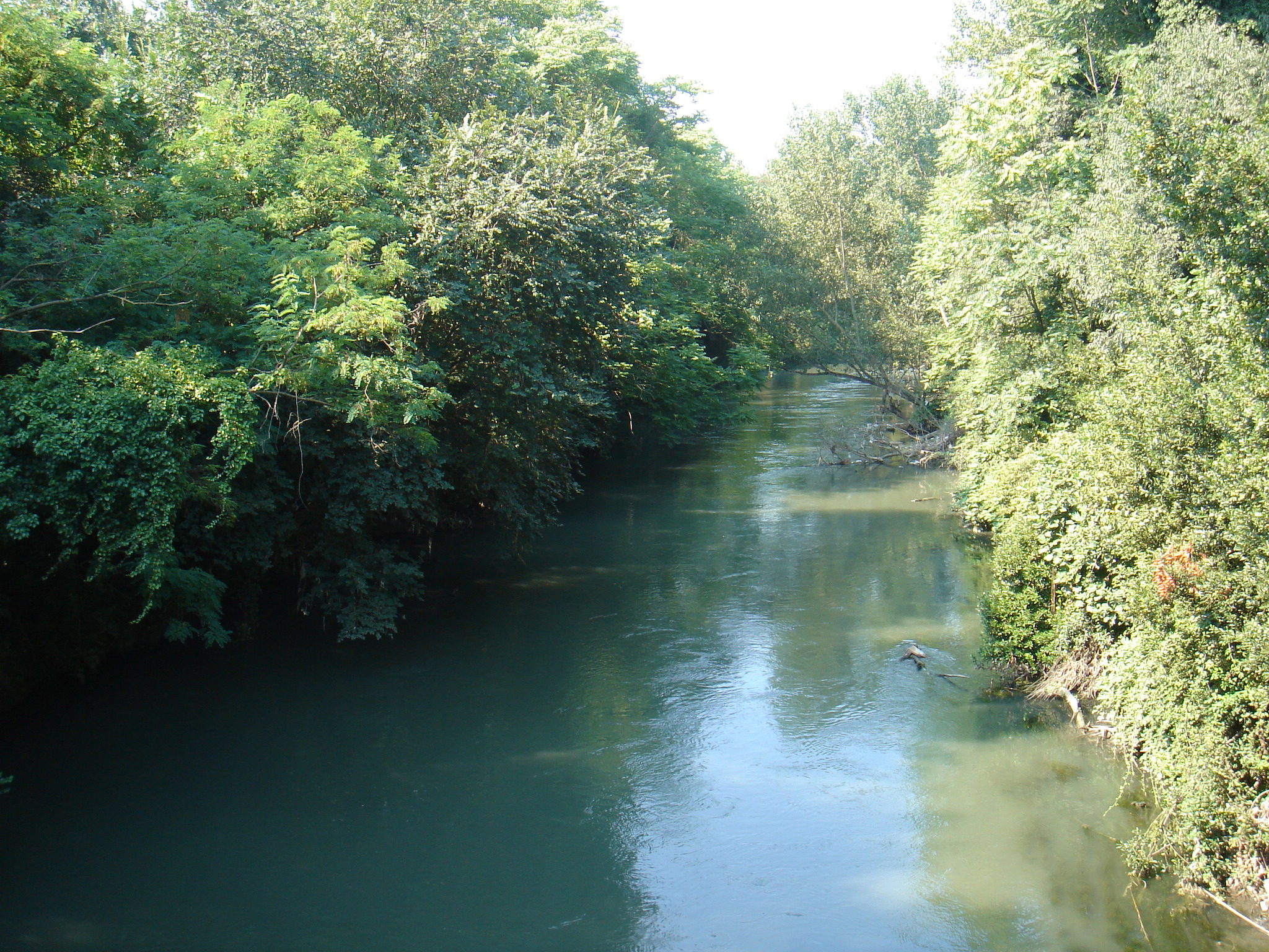 Roma, Aniene a Ponte Nomentano